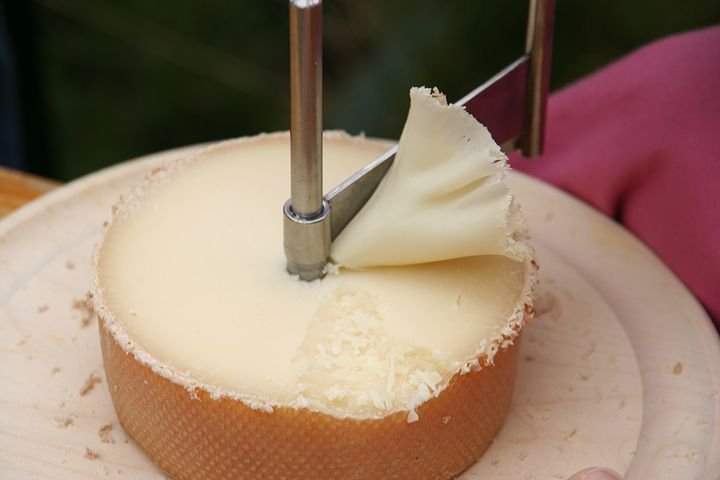 Lame de girolle formant un "pétale" de Tête-de-moine. Photo : PY. Stucki